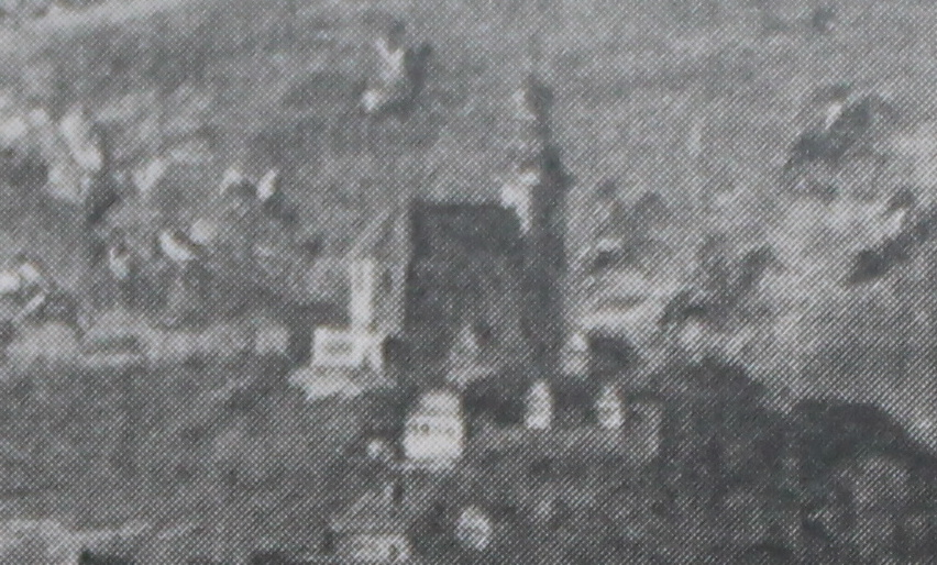 Jižní předměstí Brna asi v polovině 18. století, uprostřed kostel svatého Václava v dnešní Vídeňské ulici